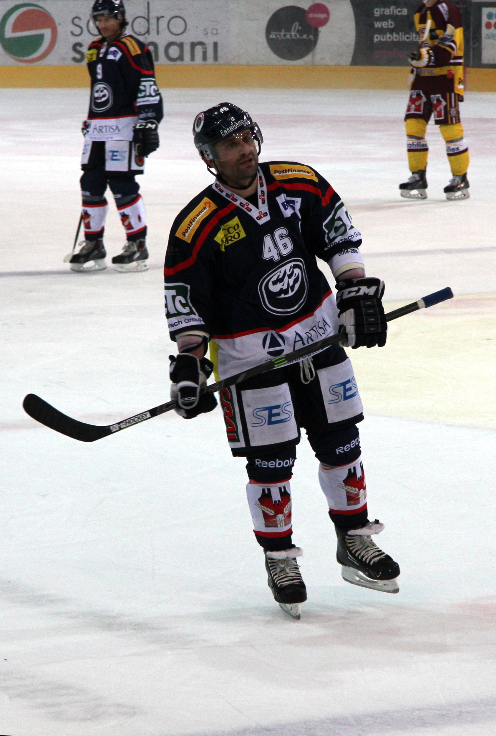 Paolo Duca (A 46).